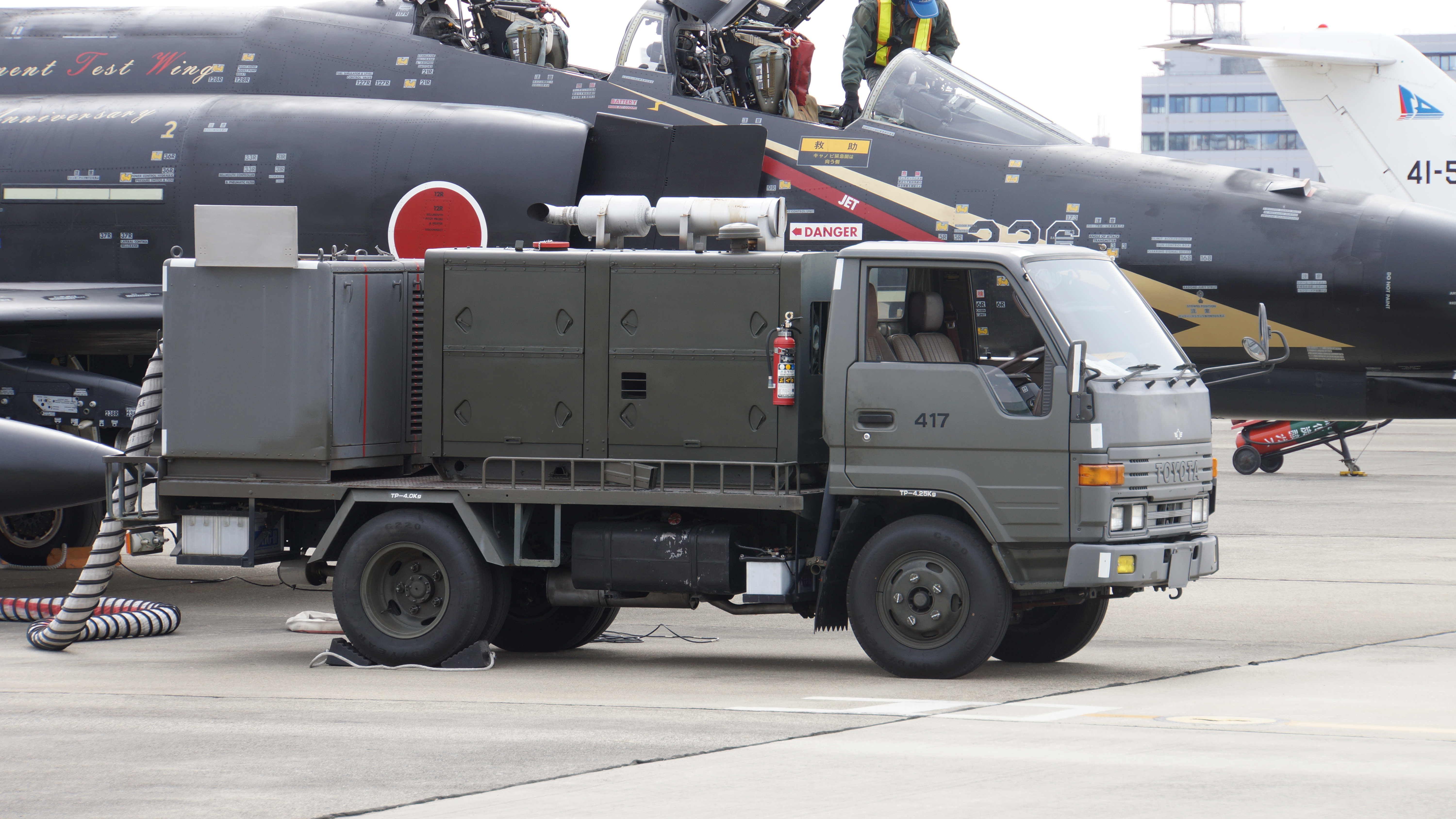 航空自衛隊 KM-3起動車（トヨタ・ダイナ200）。 2016年3月13日 小牧基地にて。